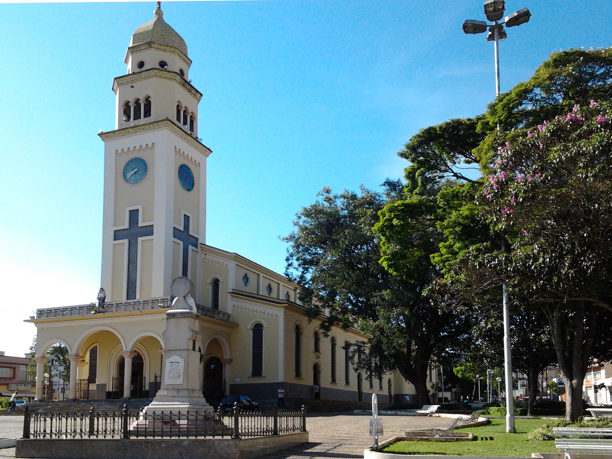 A maior e mais conhecida igreja da cidade, localizada na Praça Cônego Victor, no local que marca o início da povoação que hoje forma o município. Em primeiro plano está a herma em homenagem à Padre Victor.